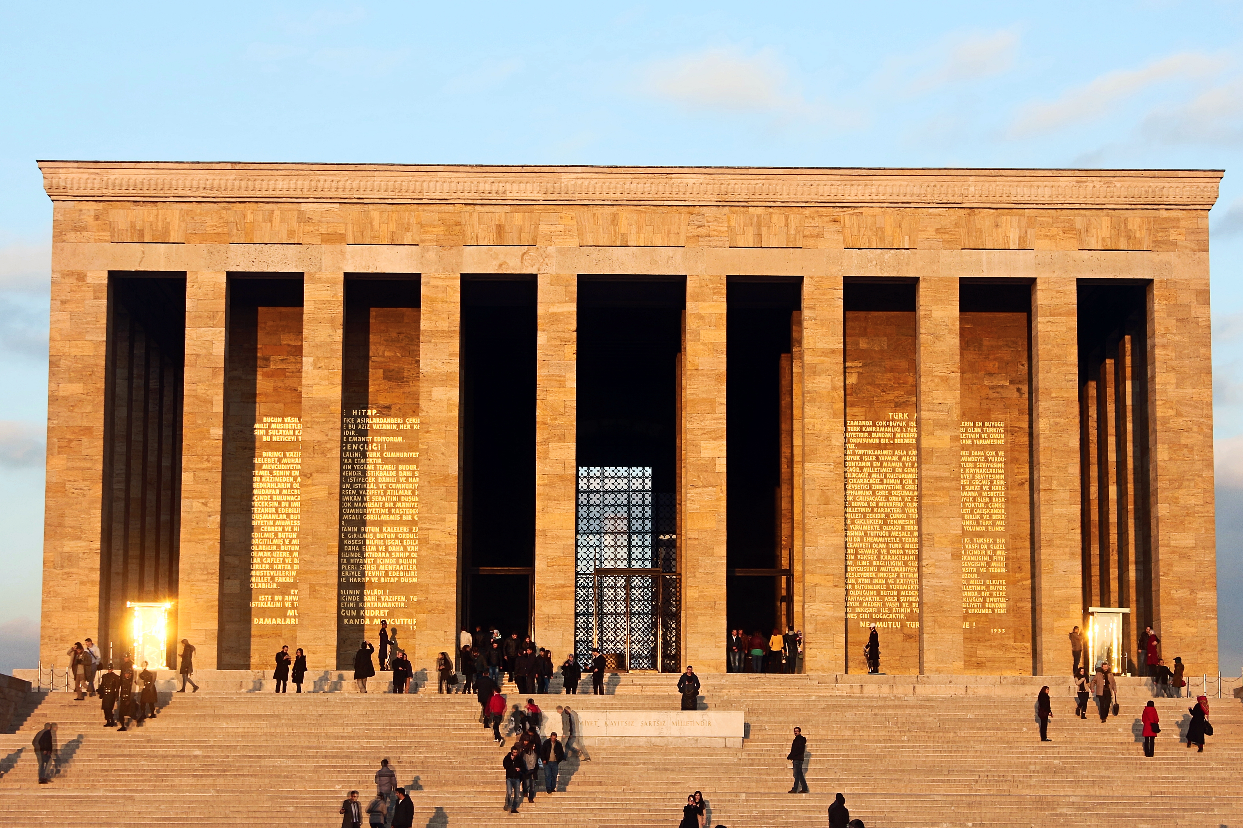 Ankara Anıtkabir